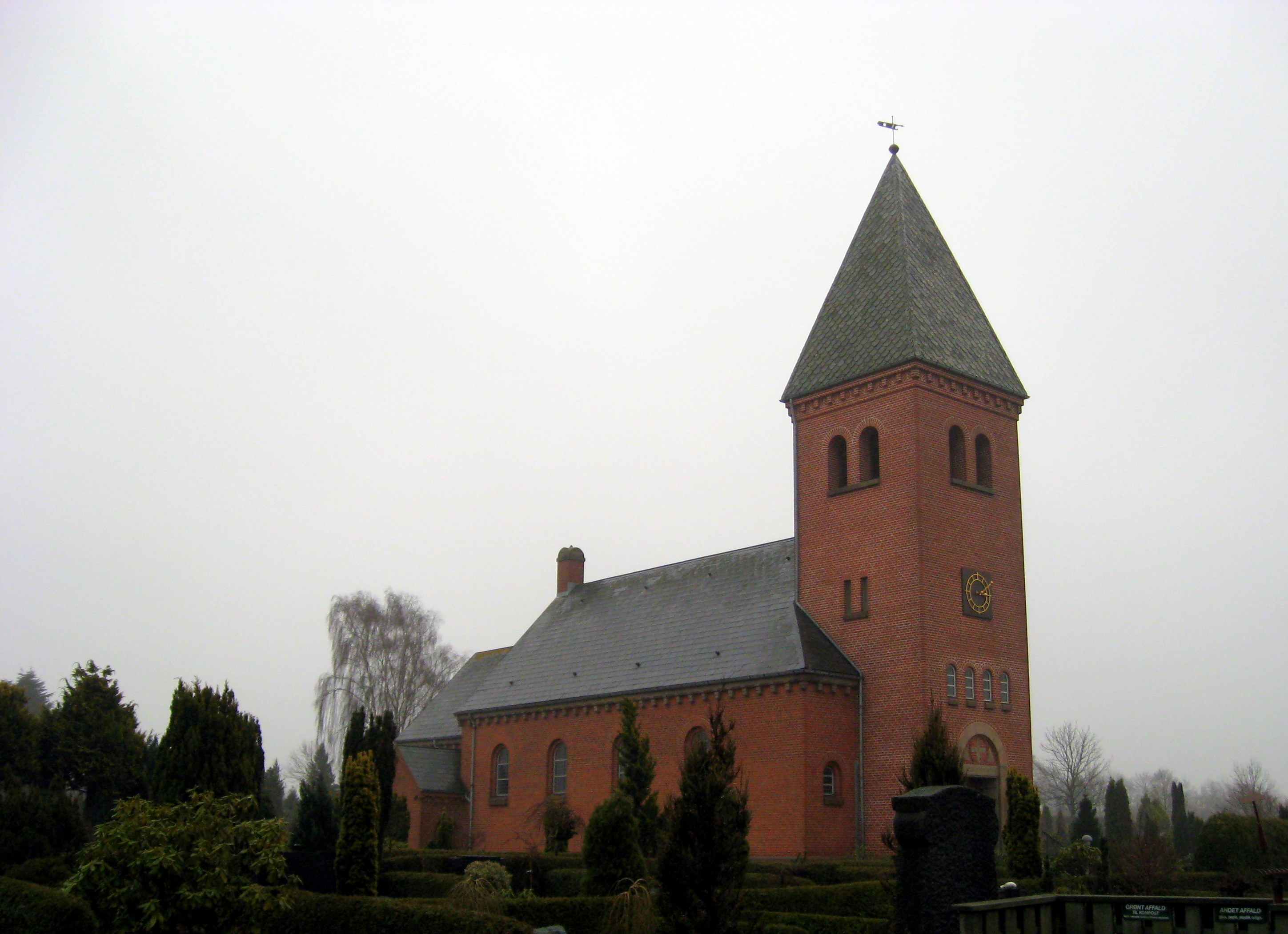 Støvring Kirke